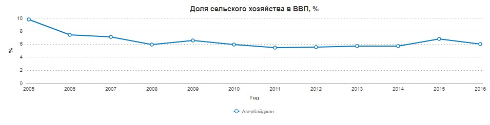 Диаграмма